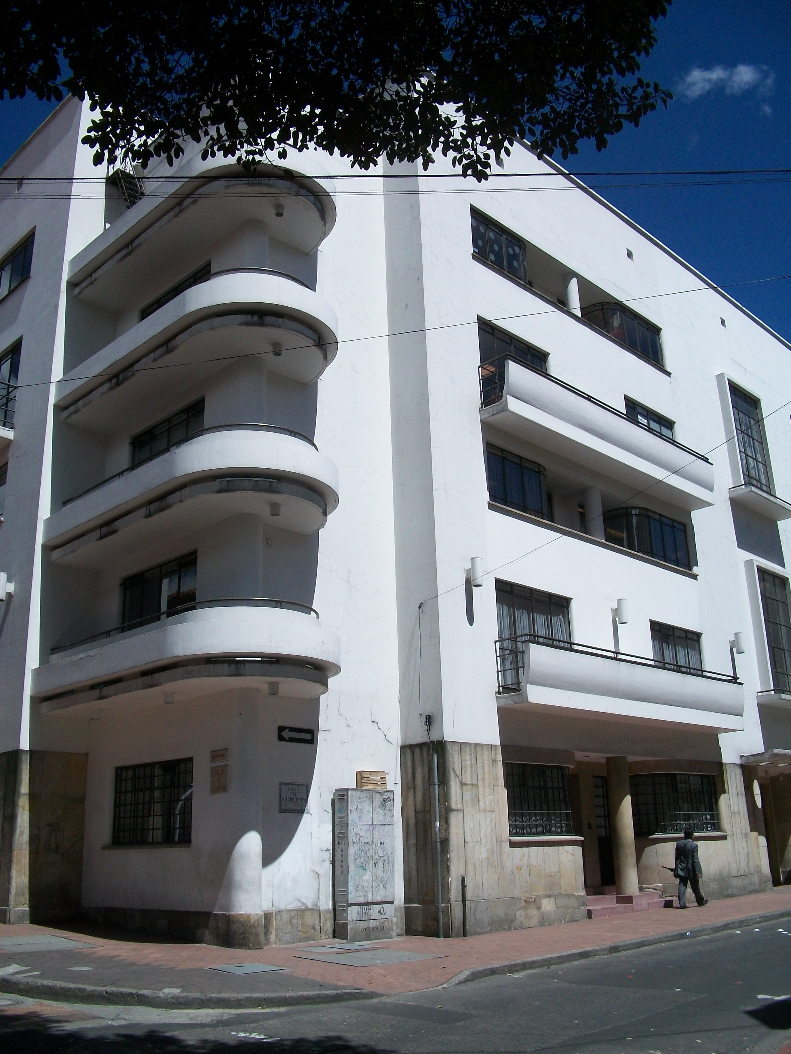 Edificio Vengoechea de la biblioteca Luis Ángel Arango en Bogotá.